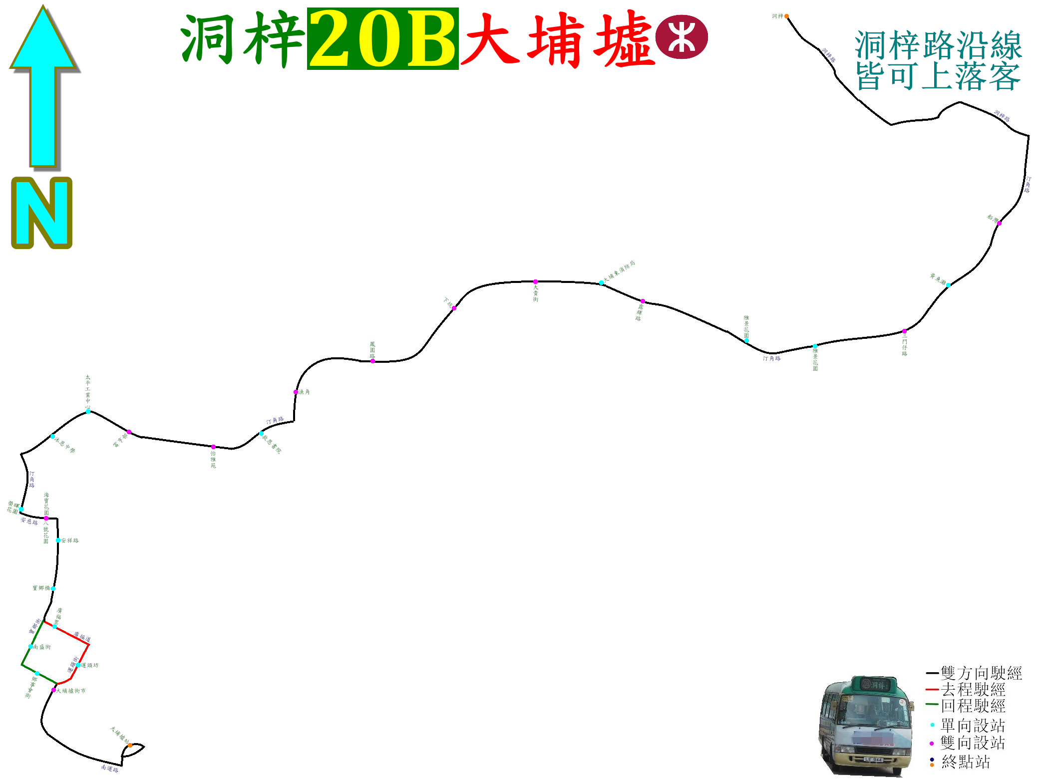 中文（香港）: 新界專線小巴20B線的走線圖